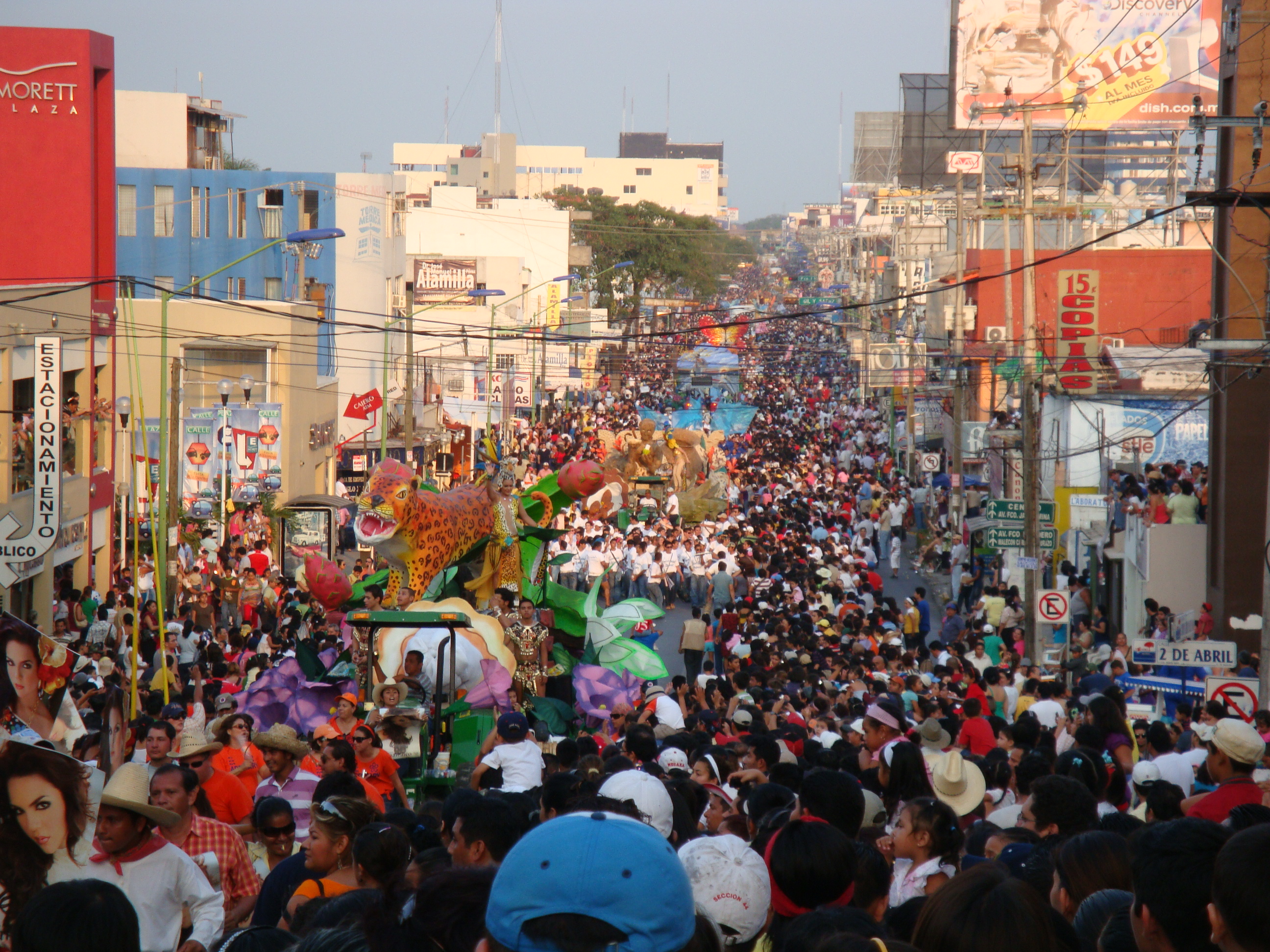 Defile de carros alegóricos, dentro de los eventos de la Feria Tabasco